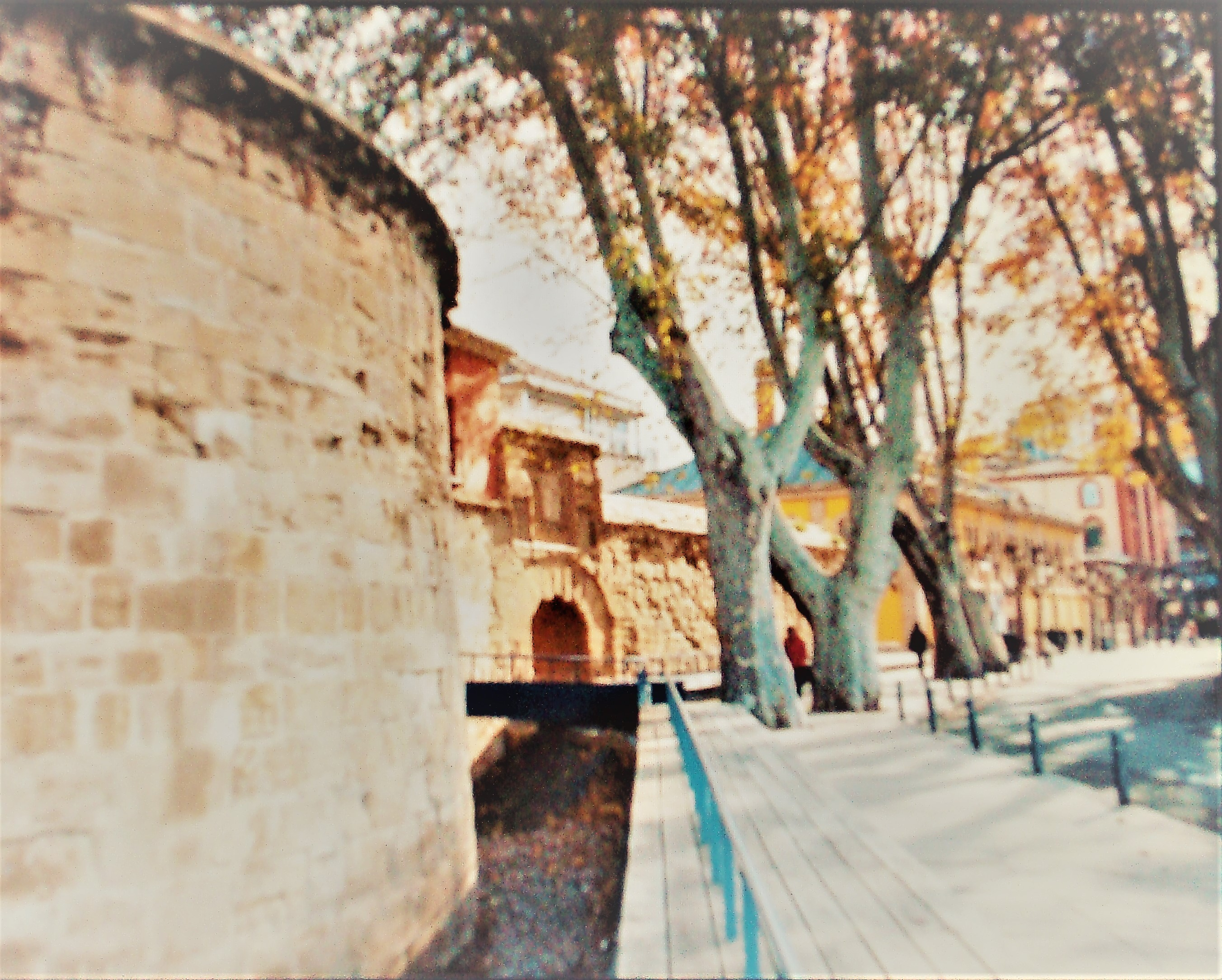 Foto del Cubo artillero